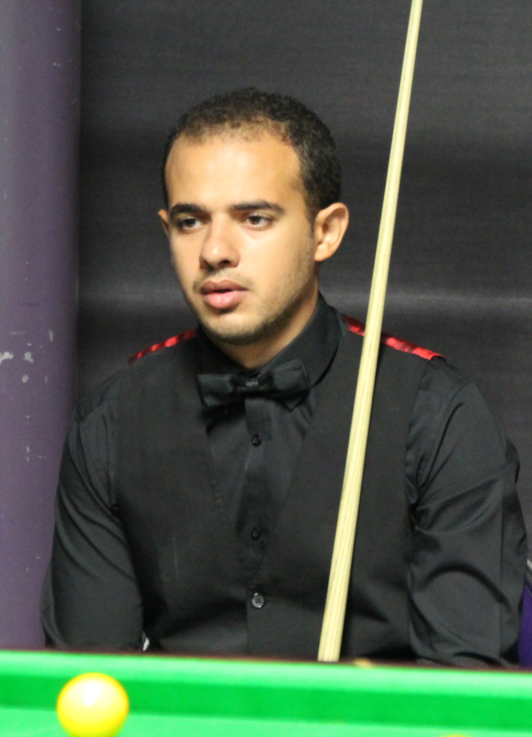 Hatem Yaseen beim Paul Hunter Classic 2016